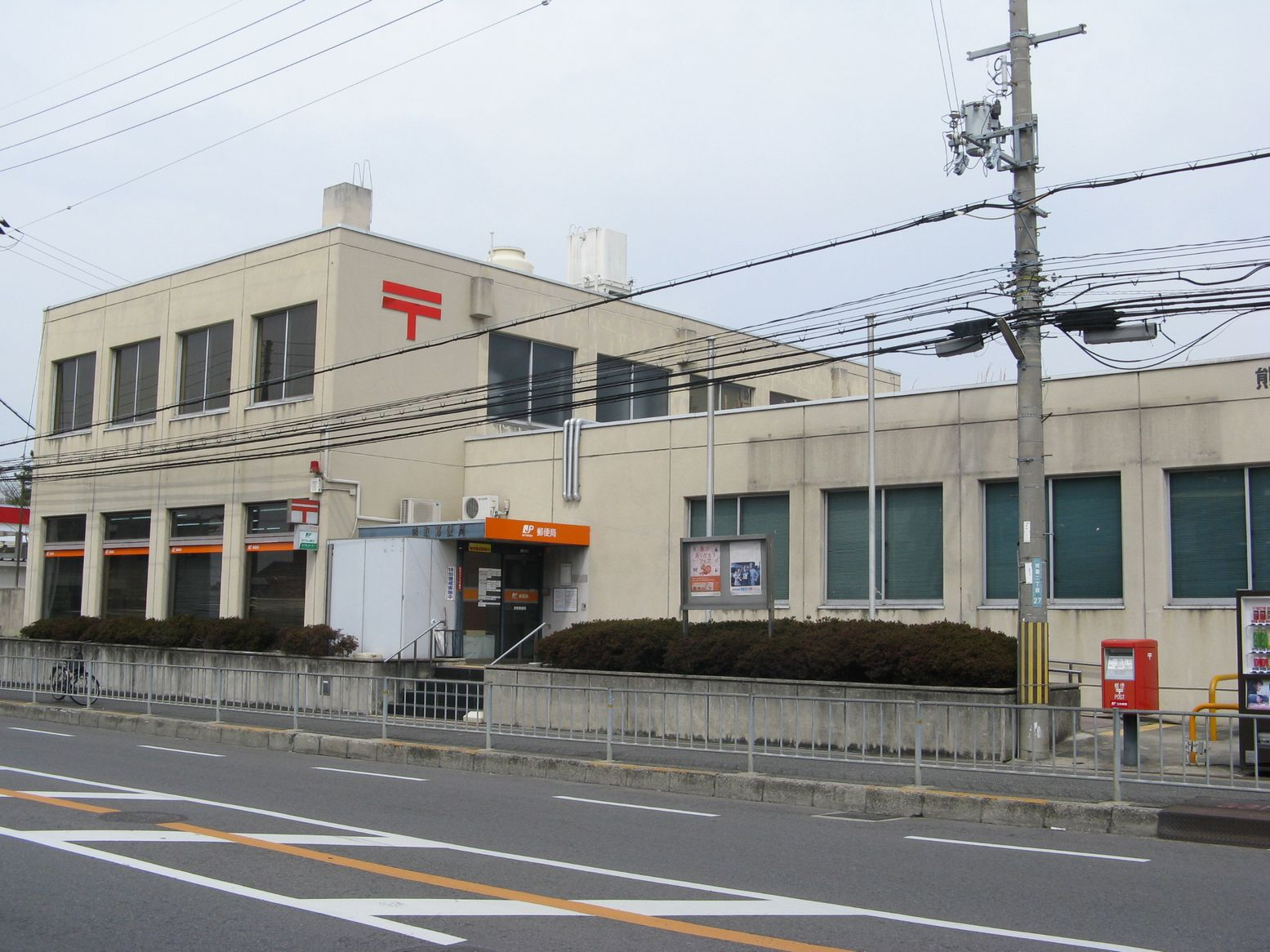 熊取郵便局（大阪府泉南郡熊取町）